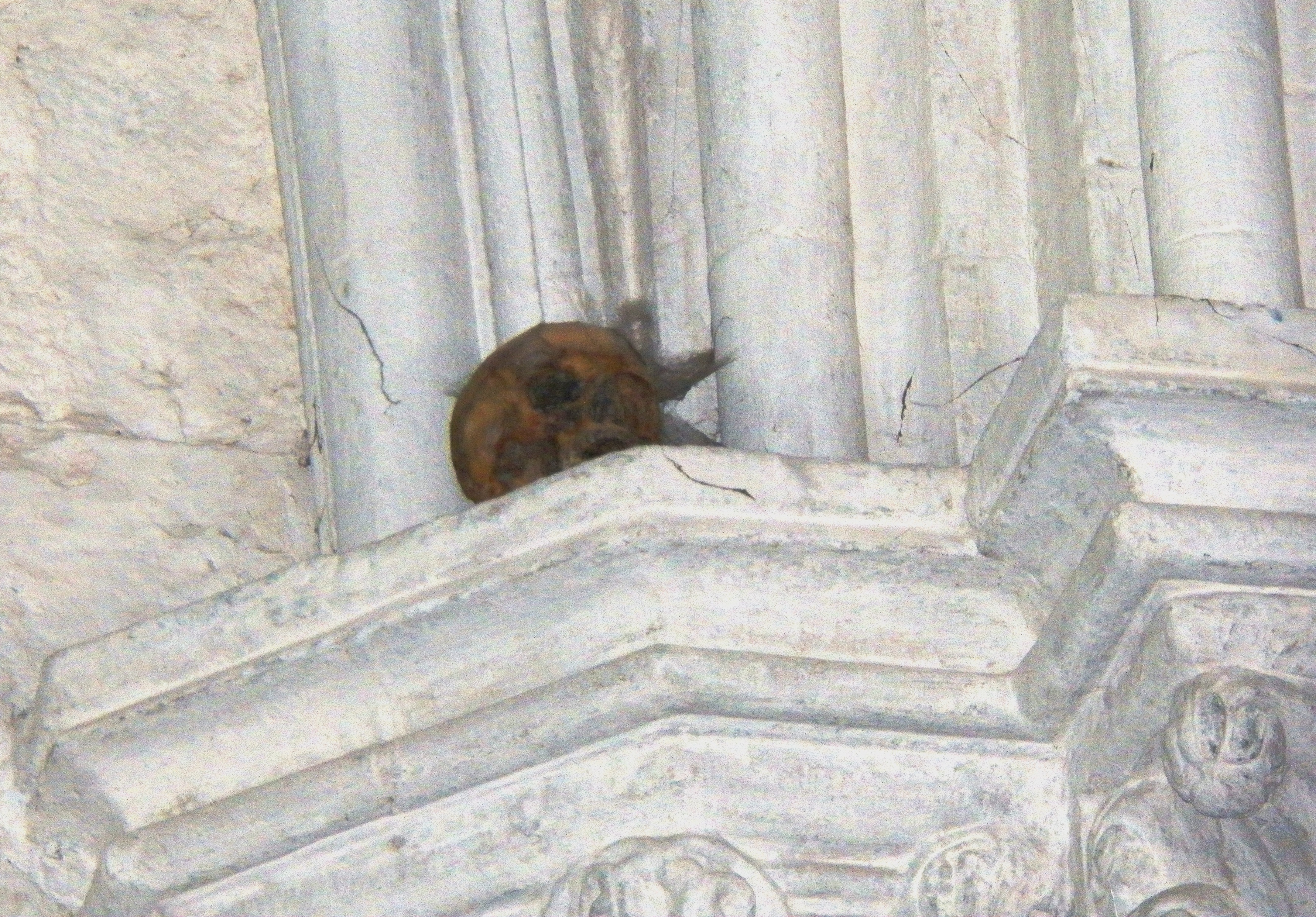 Le comte de Saillans fut l'instigateur du troisieme camp de Jalès, épisode de la contre-revolution en juillet 1792. Arrete et decapite aux Vans , sa tete fut ramenee a Largentiere et repose depuis sur un des piliers de Notre Dame des PommiersDansk: Greven af ​​Saillans var initiativtager til tredje lejr jales episode af kontra-revolution i juli 1792. Arresteret og halshugget i Vans, blev hans hoved bragt tilbage til Largentiere, og har siden været placeret på en søjle af Vor Frue af Æbler